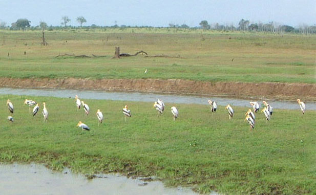 Uda Walawe, my image